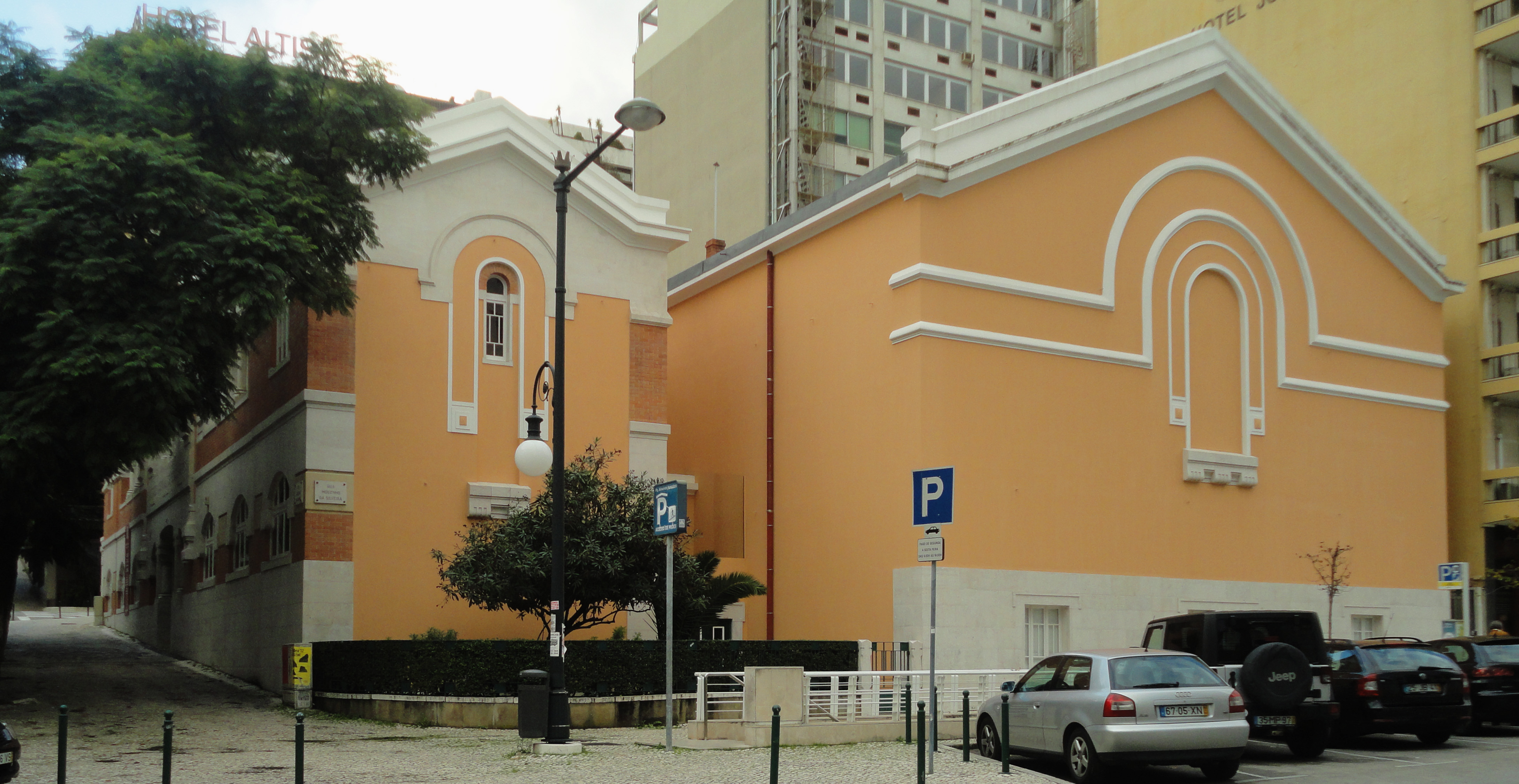 Sociedade Nacional de Belas rtes, Lisboa